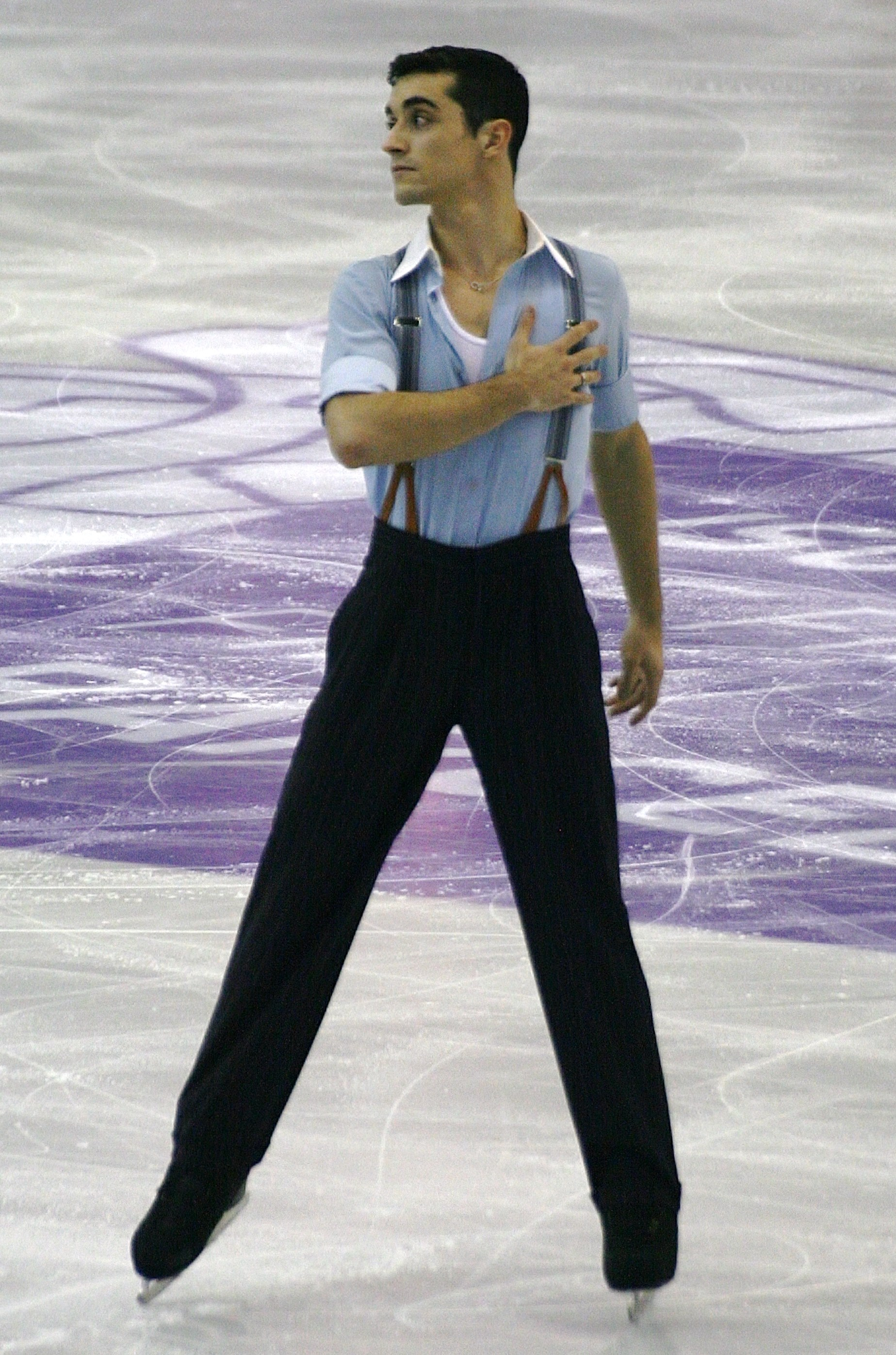 Хавьер Фернандес (Испания) на финале Гран-при по фигурному катанию 2015-2016.